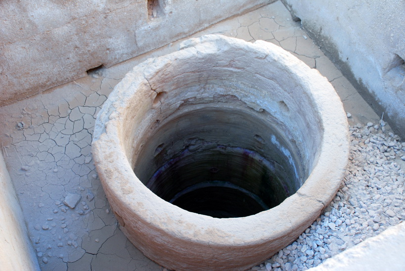 بئر ماء في مملكة ماري